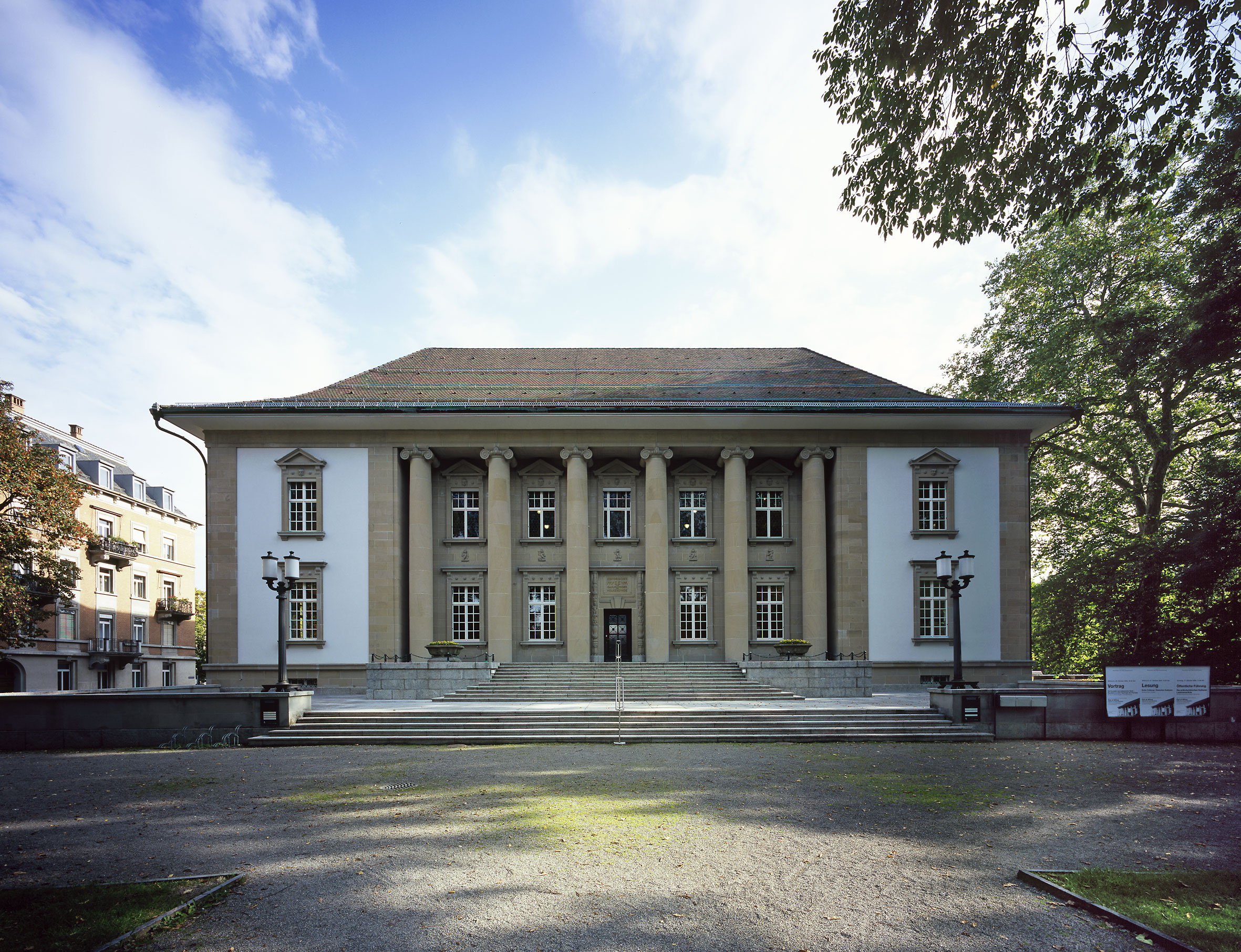 Hauptfassade des Historischen und Völkerkundemuseums St. Gallen (Museumstrasse 50)